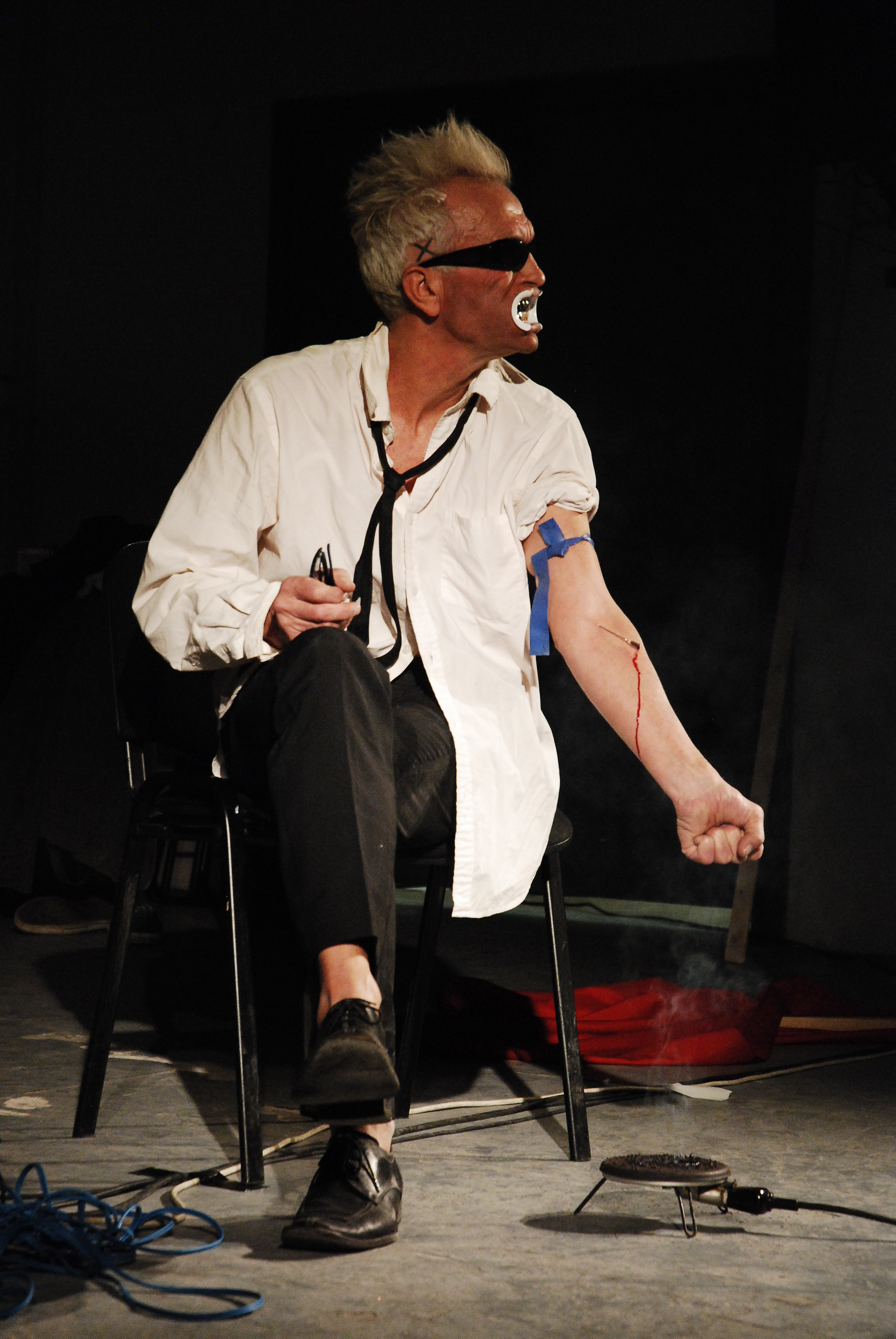 Festiwal Akcja/Acción, Istvan Kantor